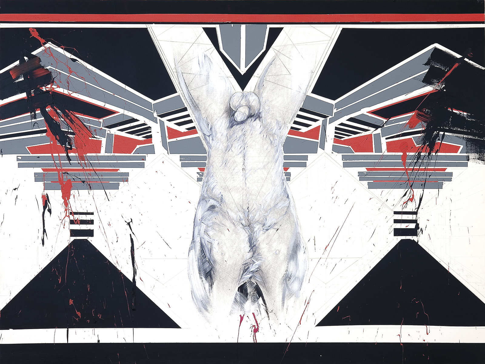 Jiří Sozanský, Z cyklu Viselci (kresba, akryl) 160 x 240 cm, 2013-2014